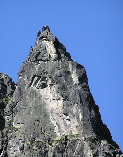 Górne partie (od dolnych półek Mnichowych) wschodniej ściany Mnicha. W lewej partii ściany prowadzi droga Stanisławskiego. Jej środkiem (przez wyraźnie widoczne M) idzie słynna droga wspinaczkowa wariant R autorstwa Jana Długosza i Andrzeja Pietsch. Jej przejście klasyczne w 1991 przez Piotra Dawidowicza i Michała Waydę było kolejnym przełomem w taternictwie.